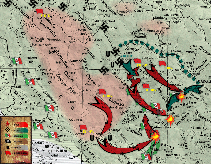 На захтев Италијана немачки штаб поделио је Северну борбену групу у два дела. Један је наступио од Бугојна према Прозору, а други од Сарајева према Коњицу